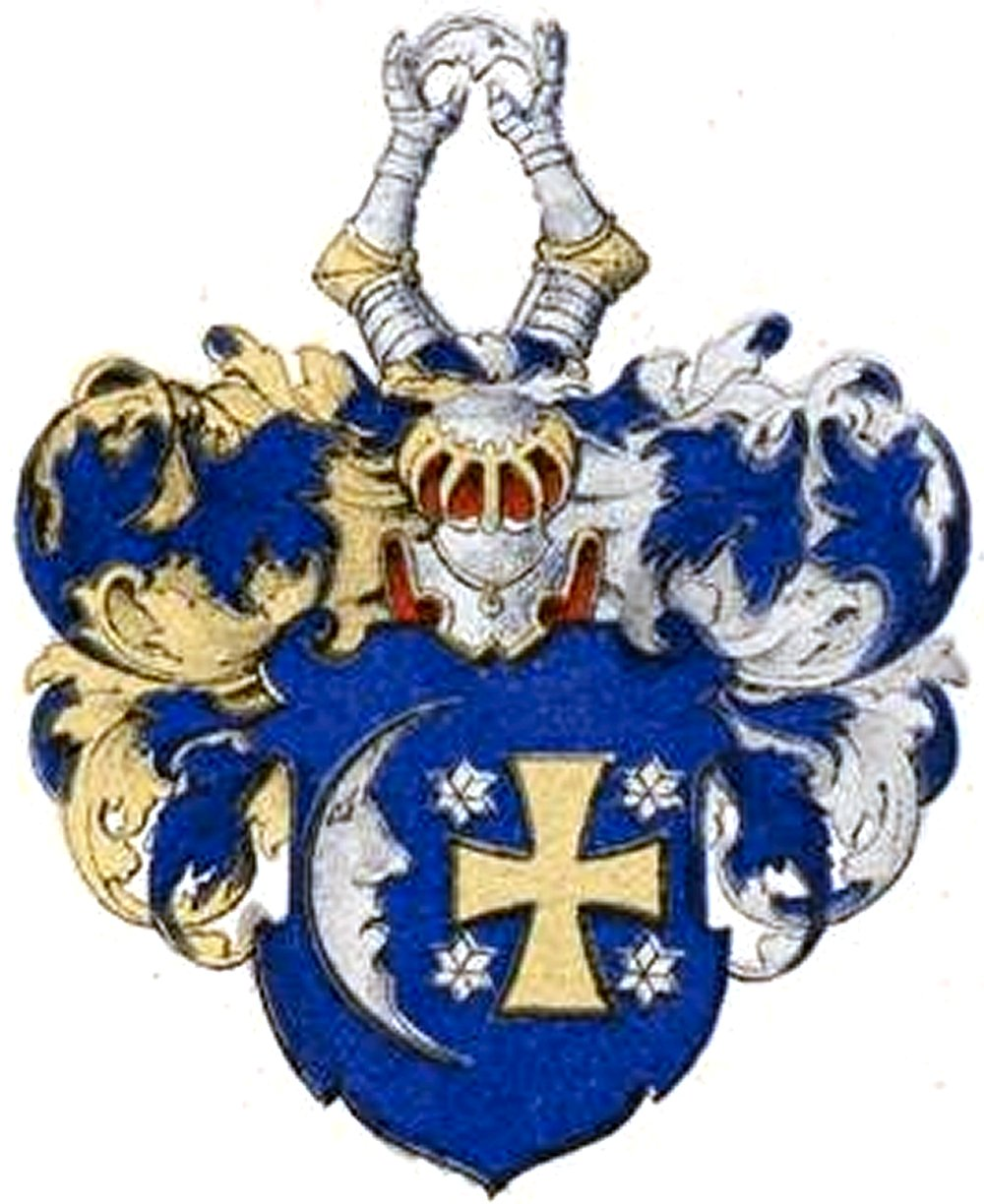 Ritterni suguvõsa aadlivapp